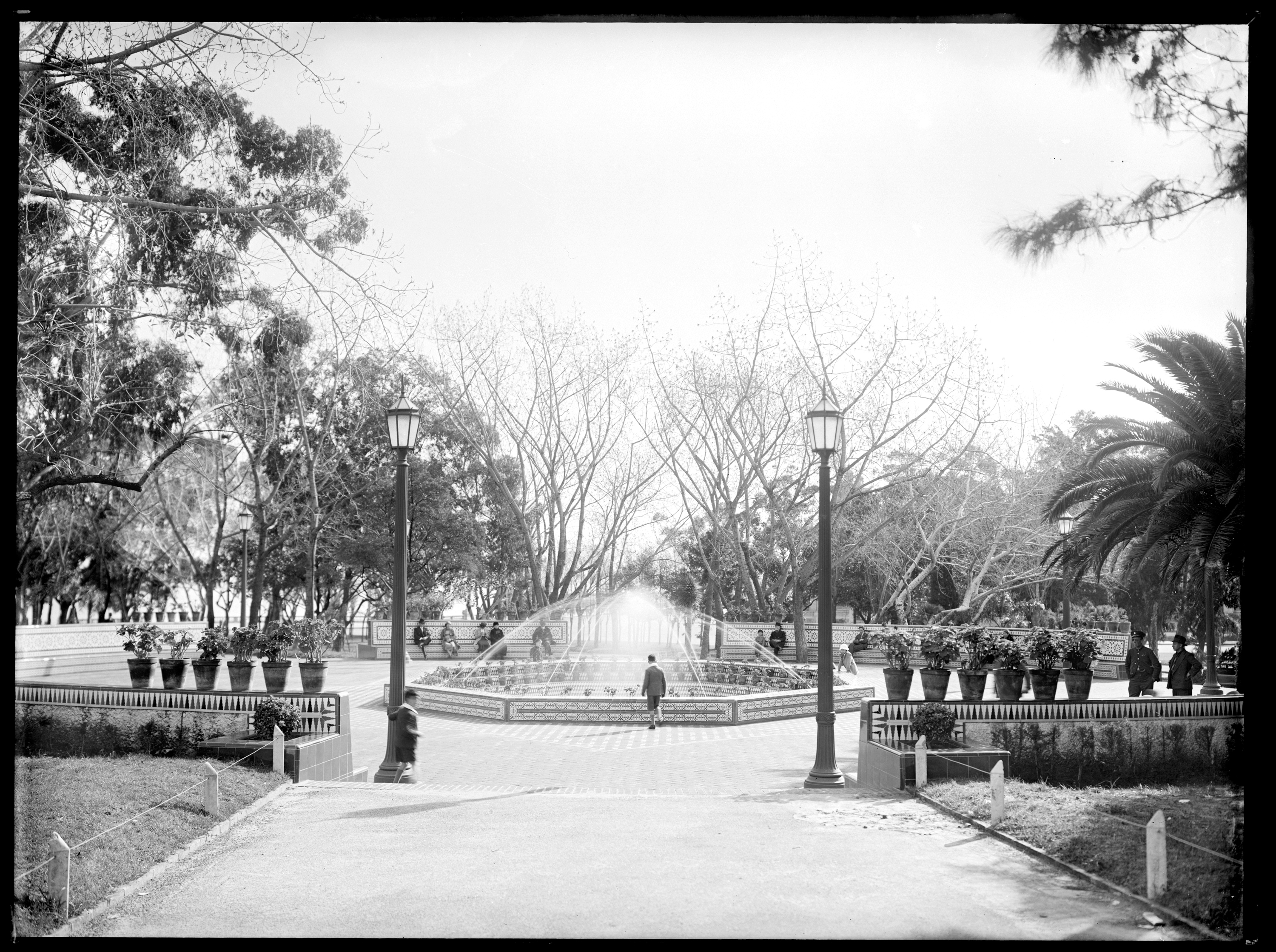 Glorieta "Ariel" (o Patio Andaluz), Parque Rodó (Montevideo, Uruguay).